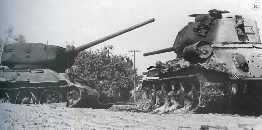 Carri sovietici T-34/85 distrutti durante la battaglia id Radzymin-Wolomin